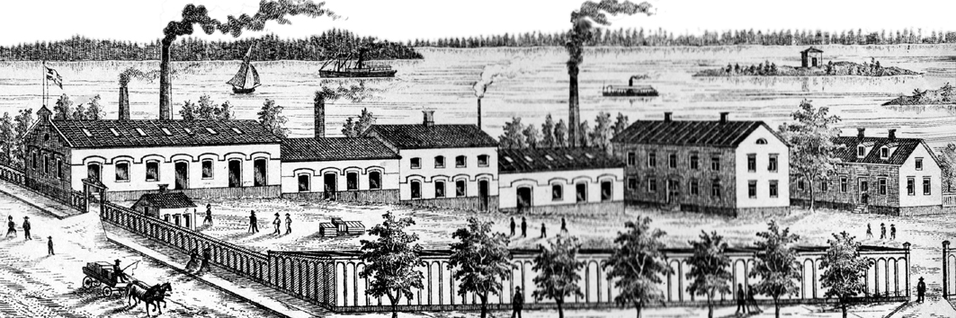 Katalogbild av Karlskrona Lampfabrik 1896.